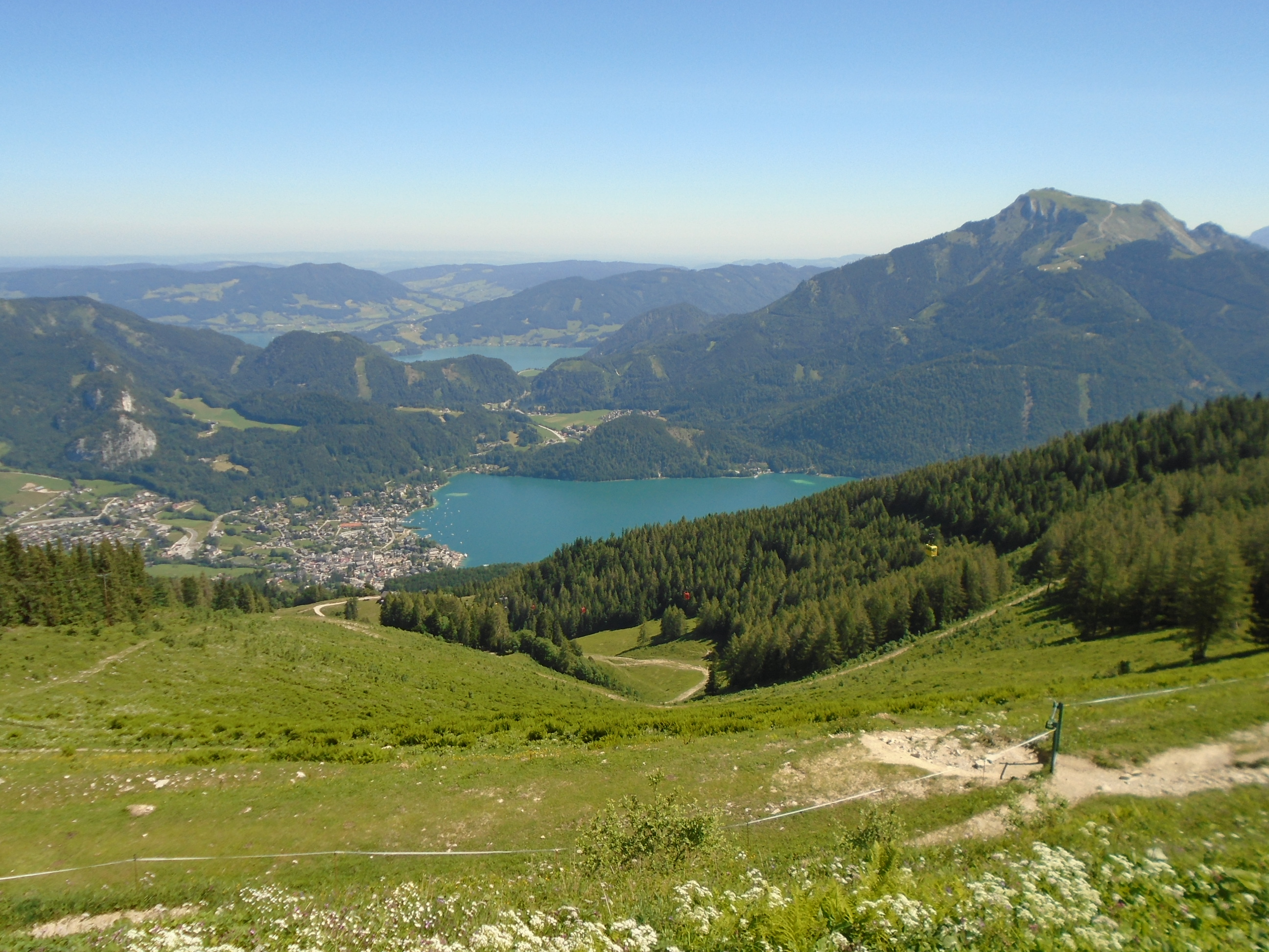 St. Gilgen, Wolfgangsee a Schafberg, Solná komora z hory Zwölferhorn